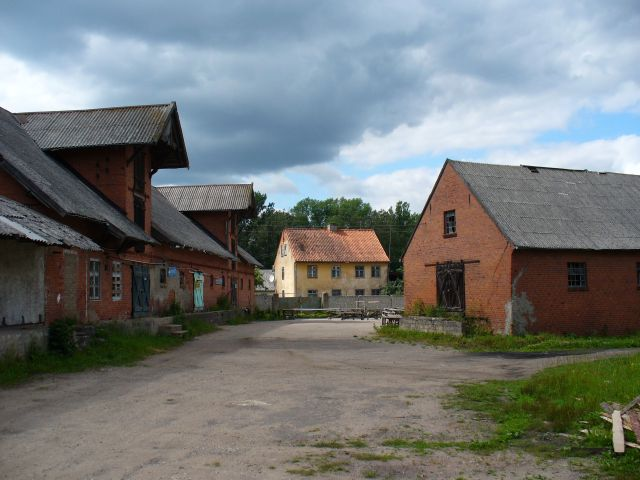 Raiffeisen Warengenossenschaft Lagergebäude